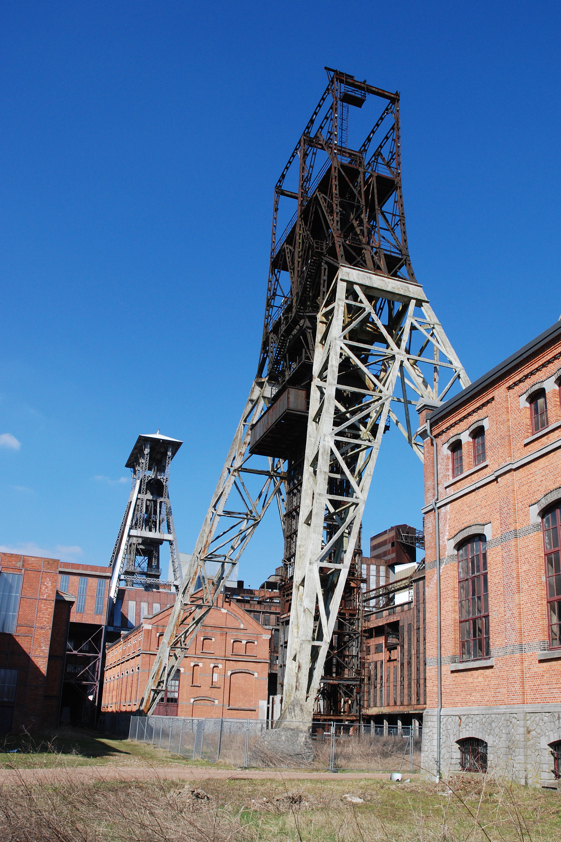 De schachtbokken van de steenkoolmijn te Beringen, België